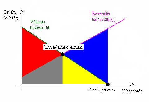 Negatív termelői externália társadalmi és magánpiaci optimuma